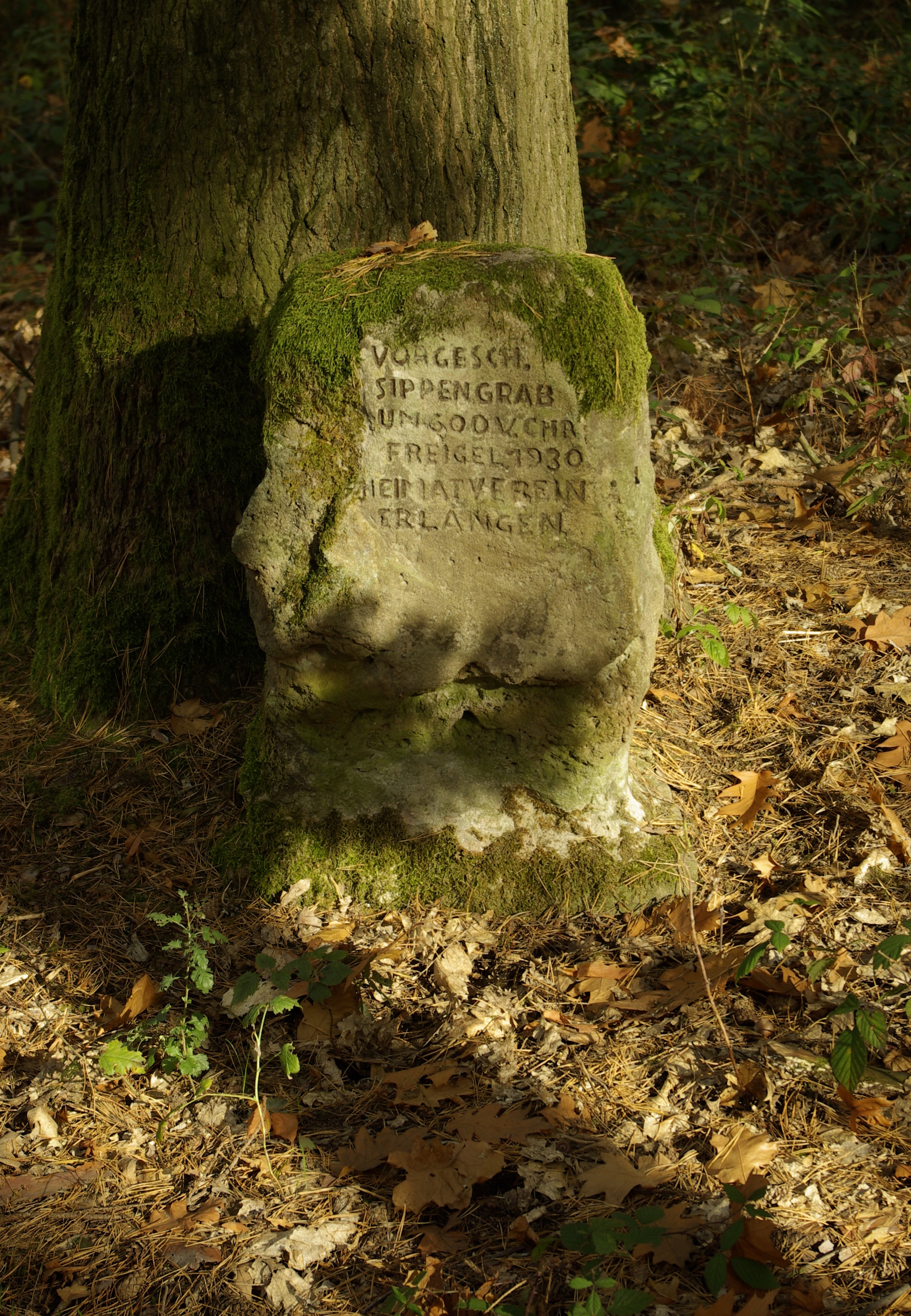 Auf dem Gebiet des Erlanger Stadtteils Kriegenbrunn wurden 1930 eine Pfeilspitze aus der Jungsteinzeit sowie zwei keltische Brandgräber und ein Hügelgrab mit einem Durchmesser von 11 Metern aus der Urnenfelderzeit (1300 v. Chr. bis 800 v. Chr.) entdeckt. Etwa 300 Meter südlich fand man Schmuck und Bronzehohlringe aus der Hallstattzeit D (650–475 v. Chr) sowie Korallenschmuck aus der Jüngere Vorrömische Eisenzeit (450 v. Chr.– Ende 1. Jahrhundert v. Chr.), was auf reiche Siedler schließen lässt.